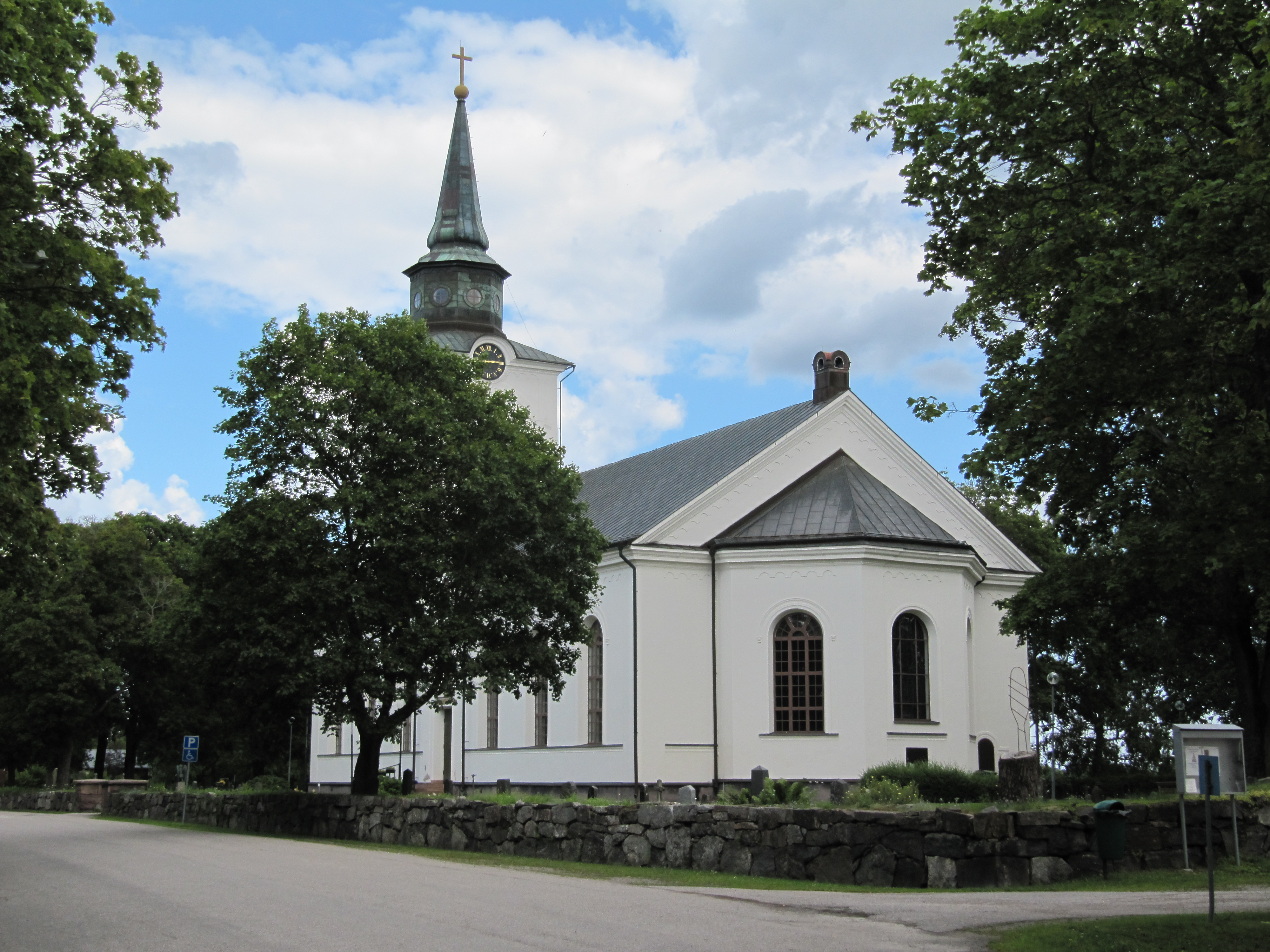 Hille kyrka